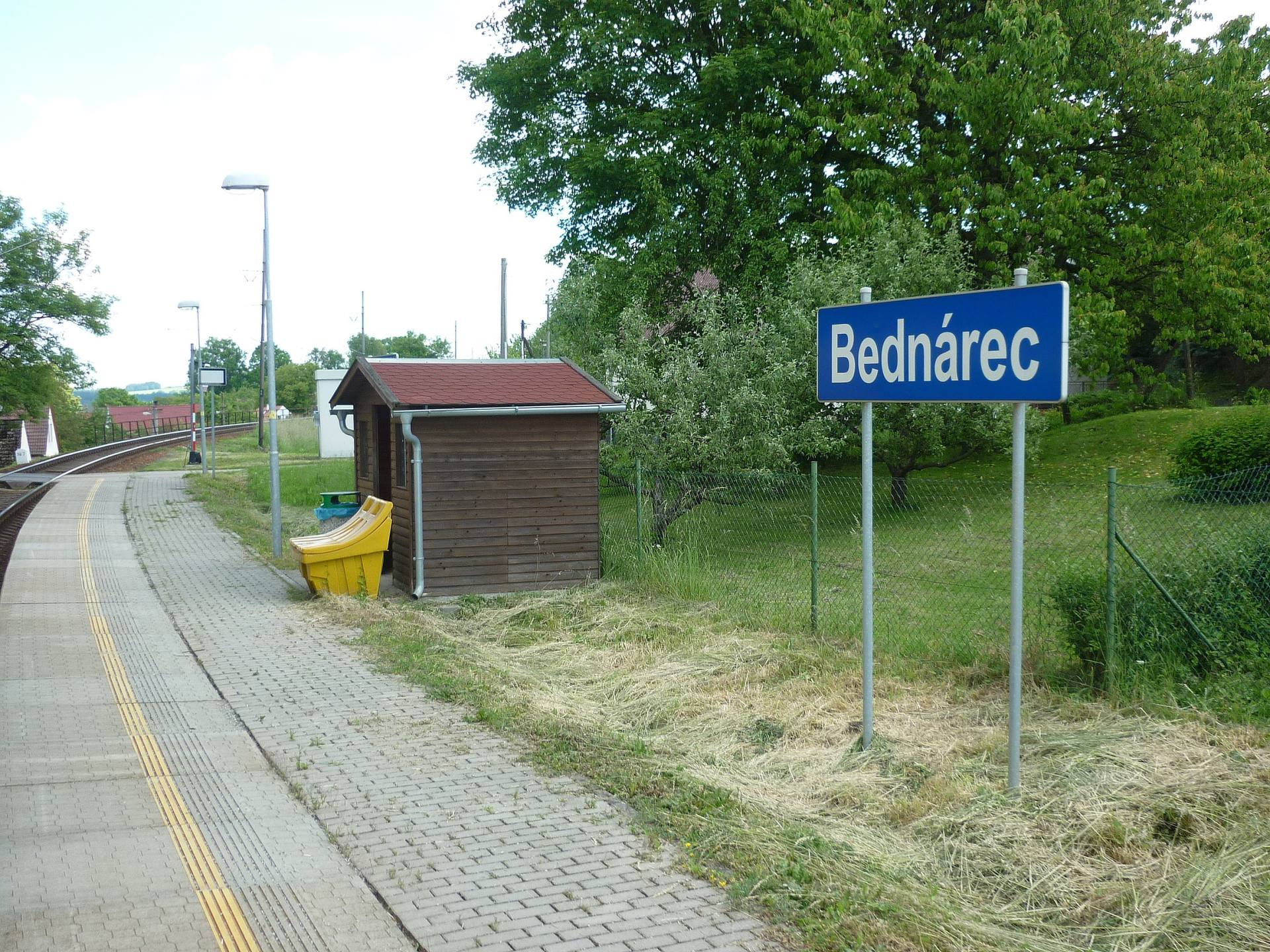 Železniční zastávka Bednárec na trati č. 225